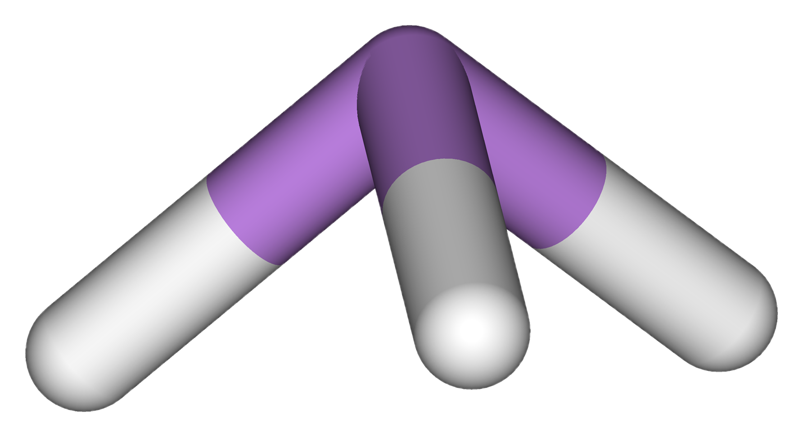 Arsine-3D-sticks